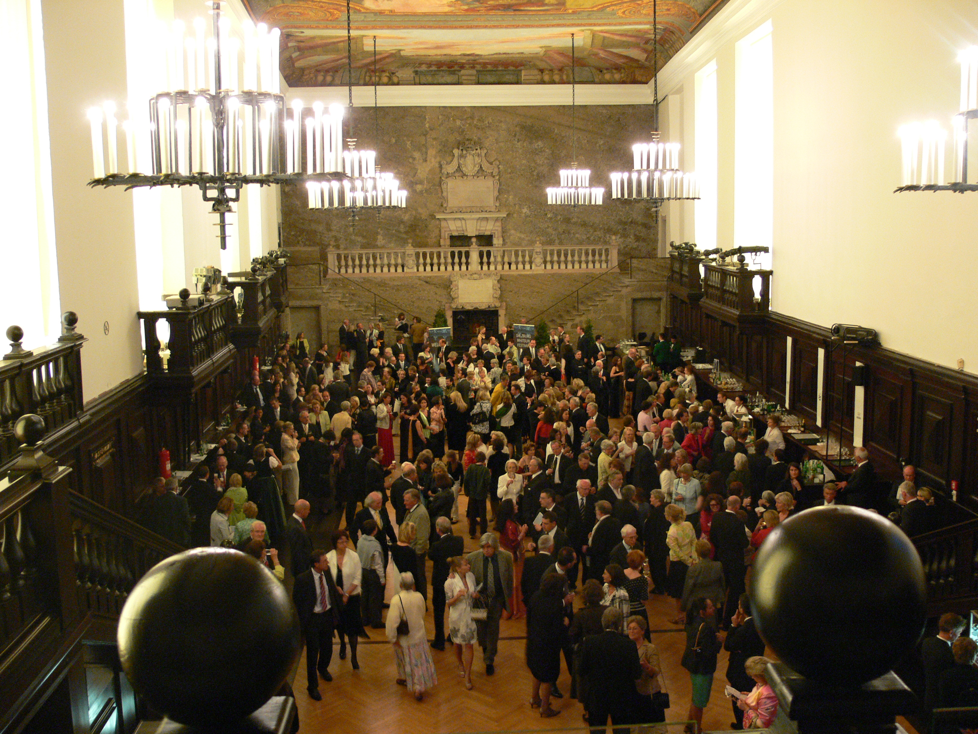 Salzburg, Festspielhauskomplex, Karl-Böhm-Saal (früher Stadtsaal), errichtet als Winterreitschule